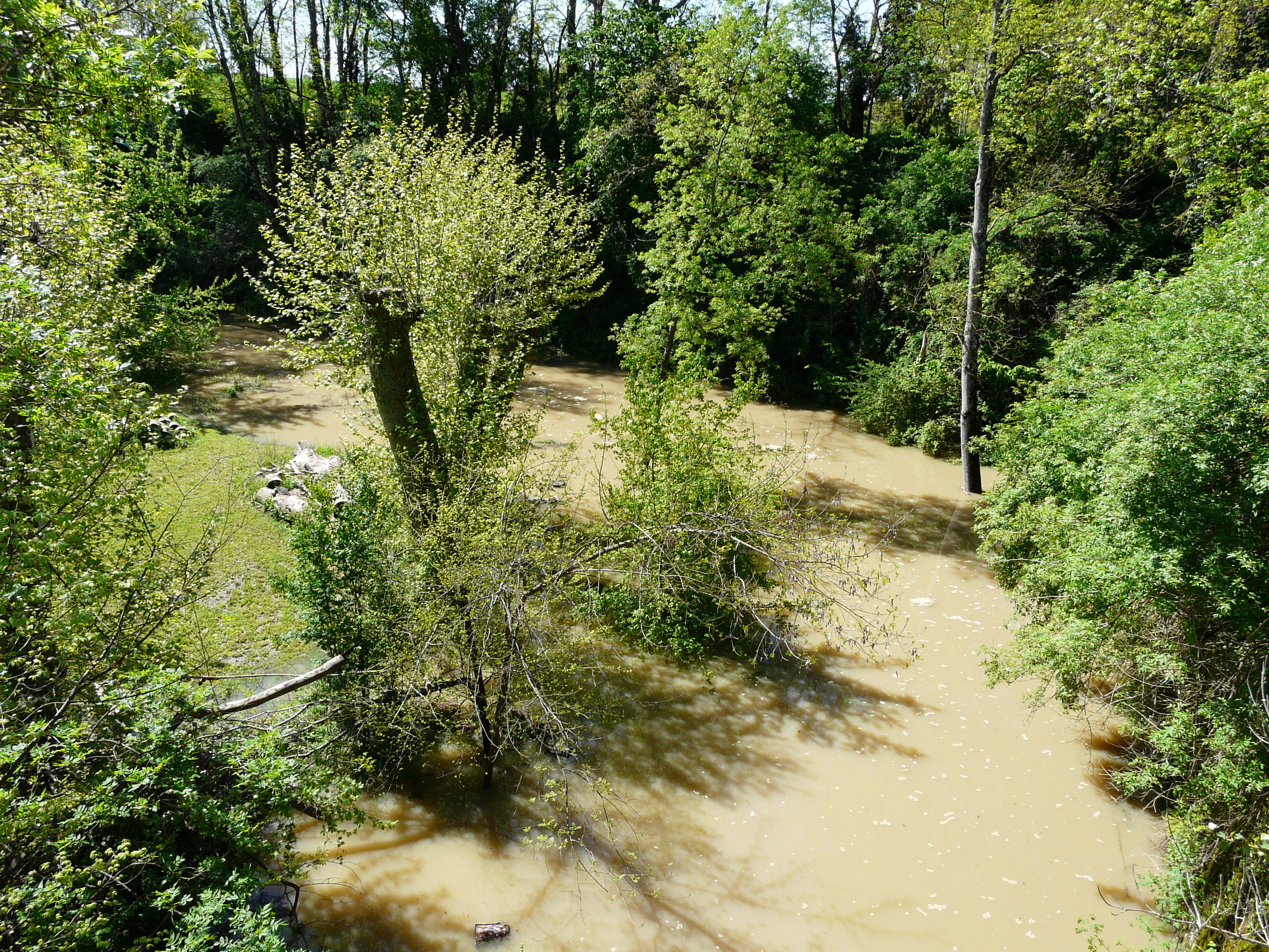 La Gardonnette en crue, en amont du pont de la route départementale 936, marque la limite entre Lamonzie-Saint-Martin (à gauche) et Gardonne (à droite) ; Dordogne, France.